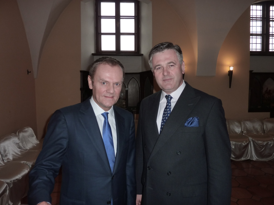 Premier RP Donald Tusk z Senatorem Jarosławem W.Laseckim